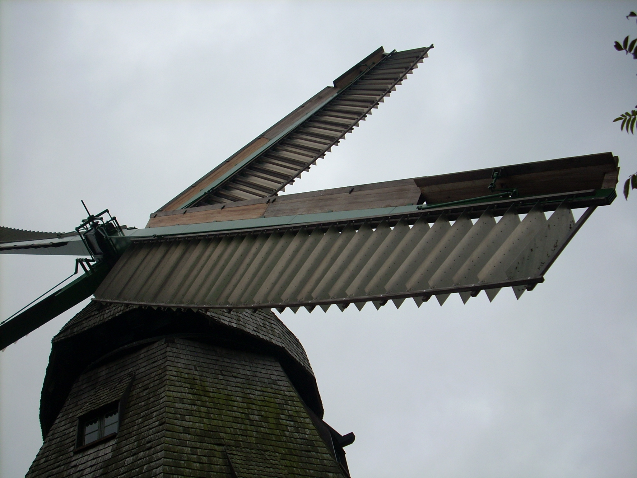 Jalousieflügel an der Windmuehle, Mühle Malchow, Bundesland Mecklenburg Vorpommern, Germany